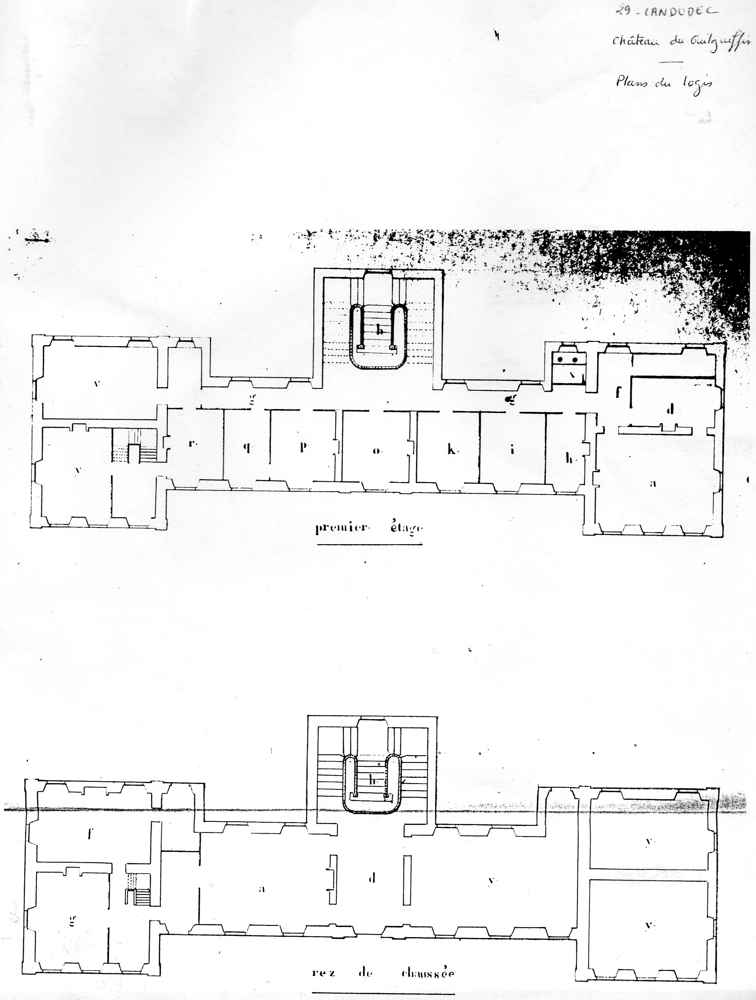 Plan du château du Guilguiffin